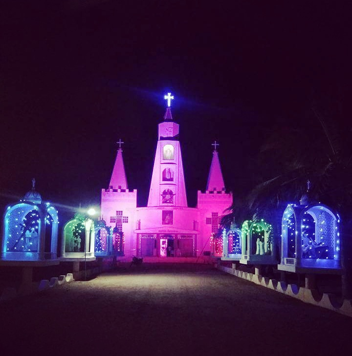 కంచనపల్లి చర్చ్: జనగామ జిల్లా రఘనాథపల్లి మండలం కంచనపల్లి గ్రామంలో నిర్మించిన చర్చికి నూట ఏడు సంవత్సరాల చరిత్ర ఉంది.దీనిని నూట పదిహేను సంవత్సరాల క్రితమే గుంటూరు నుండి ఈ గ్రామానికి వలస వచ్చిన కొందరు రెడ్డిలు ఈ చర్చిని నిర్మించారు. ఈ గ్రామంలో నల్లరేగడి భూములు ఉండటంతో వారు వ్యవసాయ రంగాన్ని ఎంచుకుని చాలా సంవత్సరాలుగా ఇక్కడే స్థిరపడ్డారు.వీరు 1910 లో చర్చి నిర్మాణానికి శ్రీకారం చుట్టి దాదాపు ఏడాదిలోపే ఈ నిర్మాణాన్ని పూర్తిచేసారు.కొన్ని సంవత్సరాల పాటు చర్చిలో ప్రార్థనలు చేసి సుమారు ఎనభై సంవత్సరాల పాటుగా వేడుకలను జరుపుకుంటున్న క్యాథలిక్ క్రైస్తవులు రోజురోజుకీ వారి జనాభా పెరుగుతుండటంతో పాత చర్చికి పక్కనే 1990 లో కొత్త చర్చి నిర్మాణానికి శ్రీకారం చుట్టారు. ఈ గ్రామంలో సుమారుగా మూడు వందలకు పైగా క్రైస్తవ కుటుంబాలు, పన్నెండు వందల మంది ఉన్నారు. Church Raghunathpally Mandal, Kanchanapally, Telangana 506244